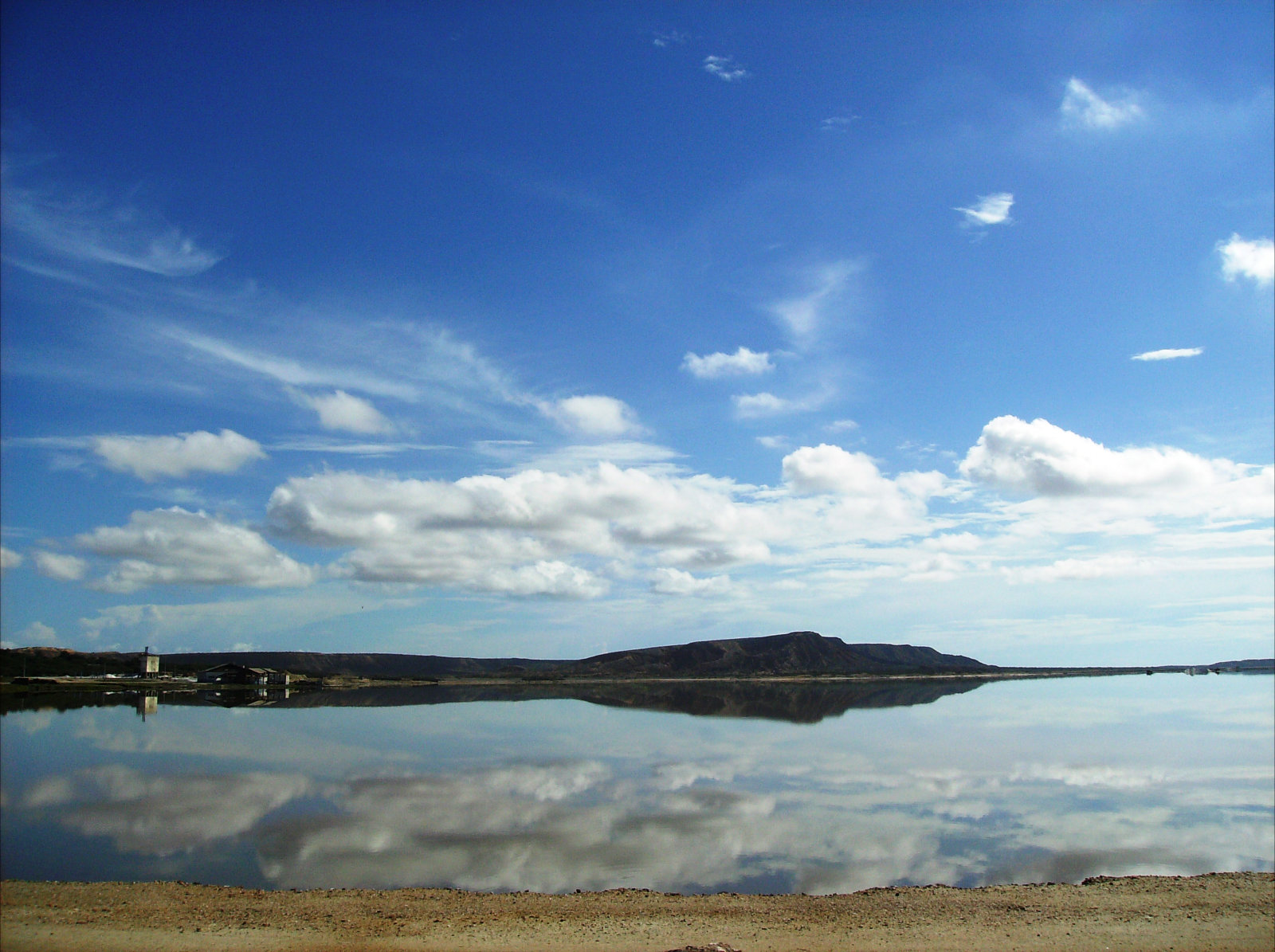 Laguna Madre, es la que se encarga de regalar al hombre las rocas de la mejor sal del mundo.